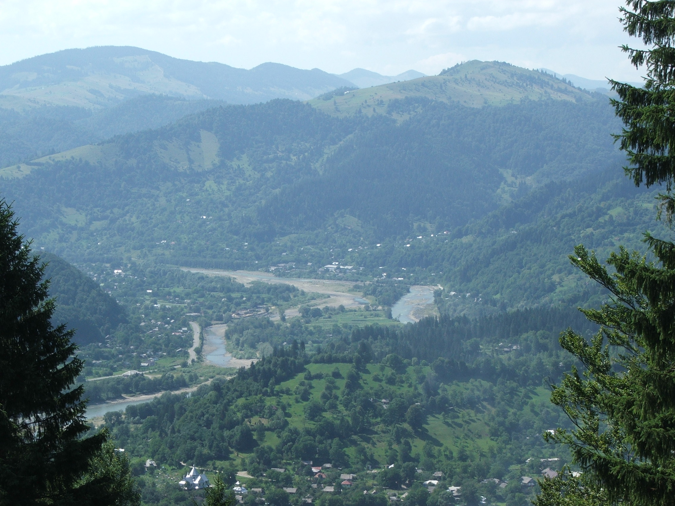 Roztoky-1.jpg: село Розтоки (Чернівецька область та Івано-Франківська область)